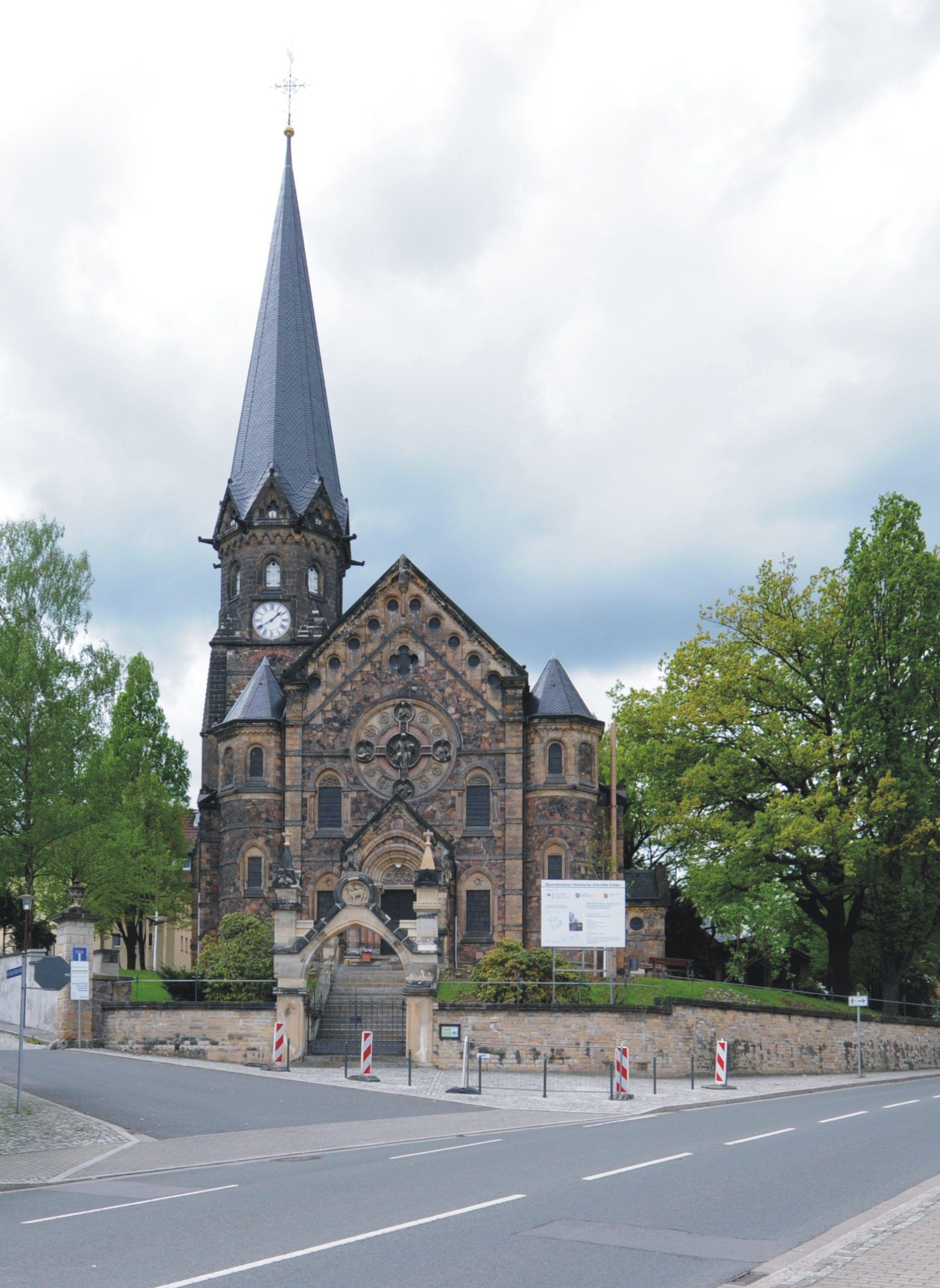 Lutherkirche in Freital-Döhlen, Sachsen, Deutschland; erbaut 1880-1882 nach Entwurf des Architekten Gotthilf Ludwig Möckel; unter Denkmalschutz